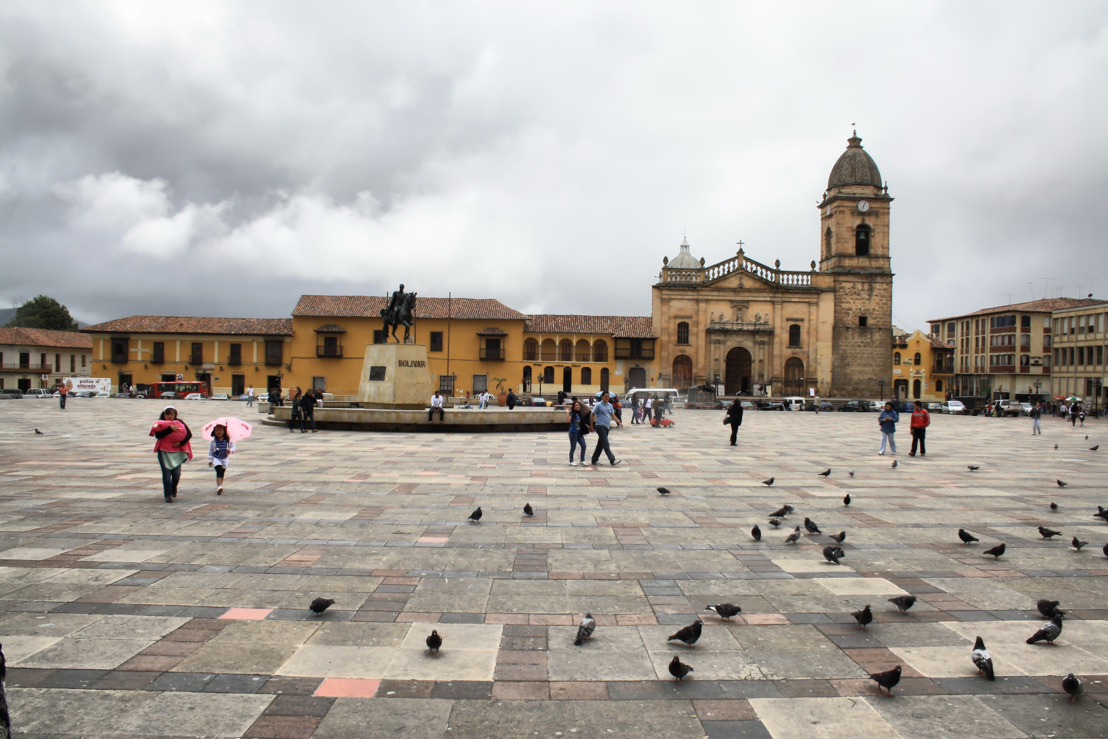 Sector Antiguo de la ciudad de Tunja